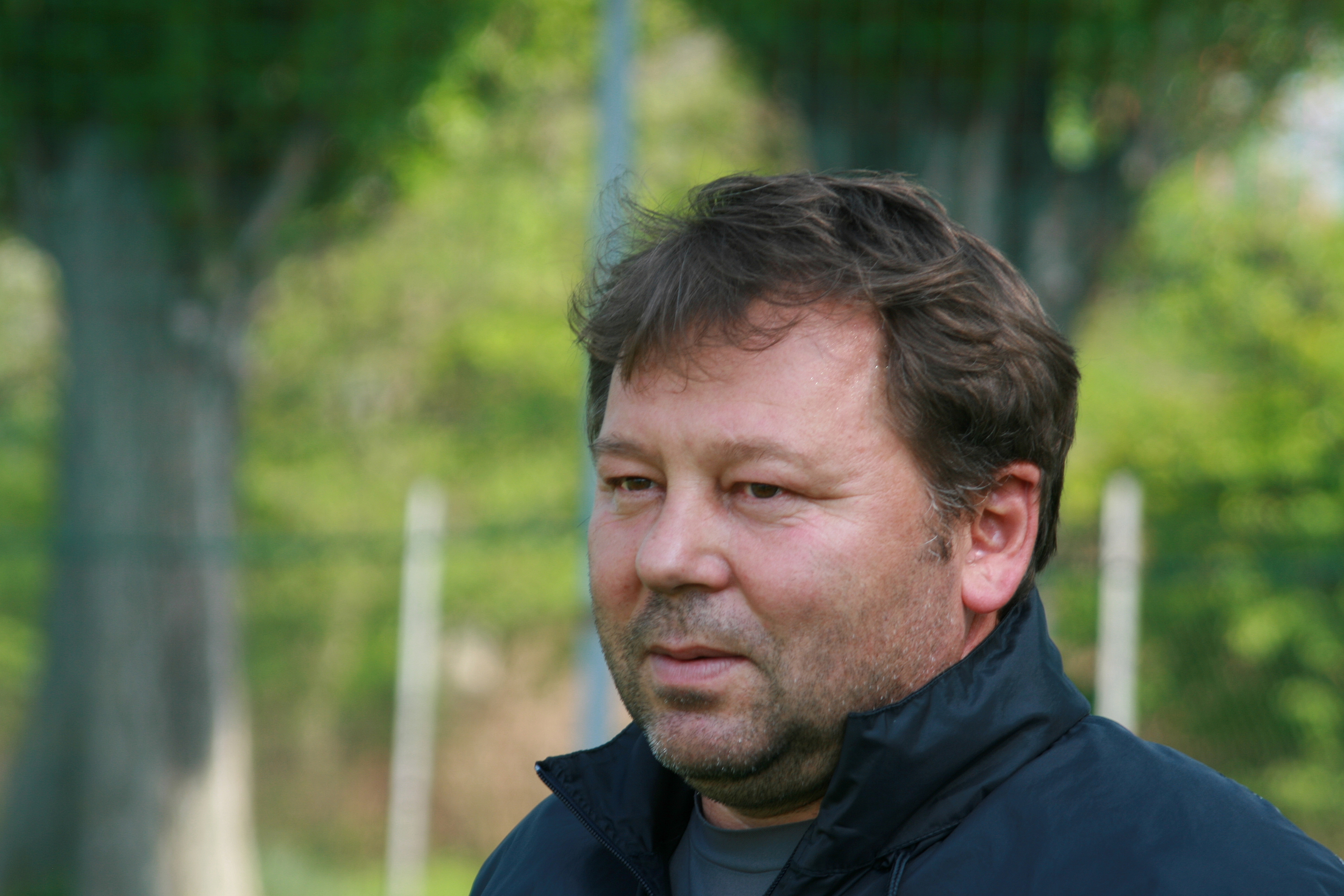 Ivan Smudla - SV Mattersburg (Bild 2)